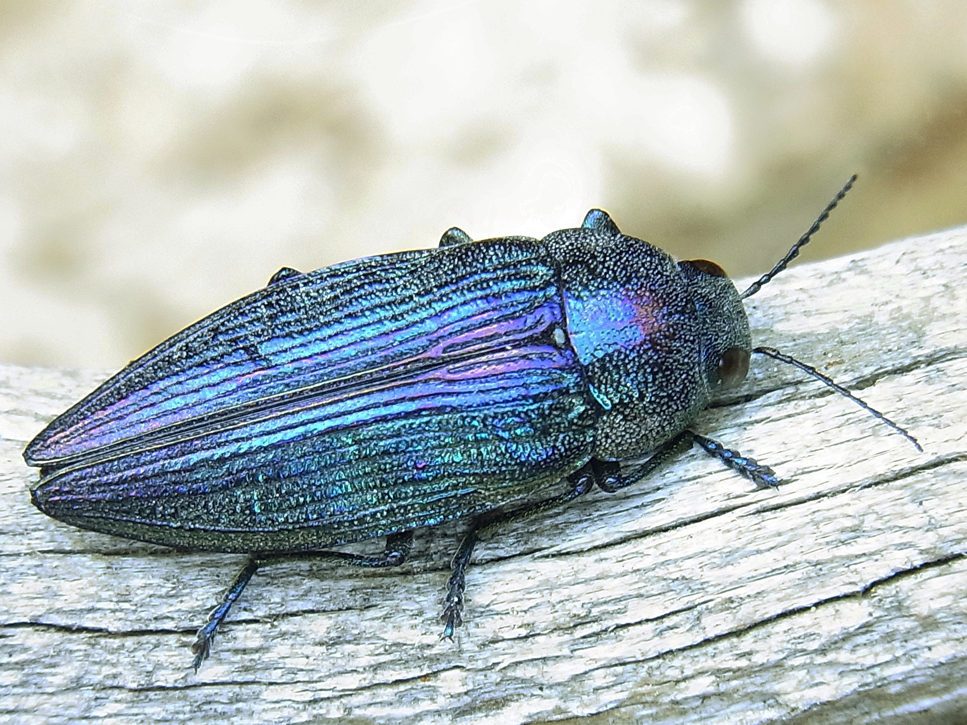 Buprestis rusticaÖsterreich-Steiermark-Weißkirchen, beim Salzstiegelhaus 1560-1600 m